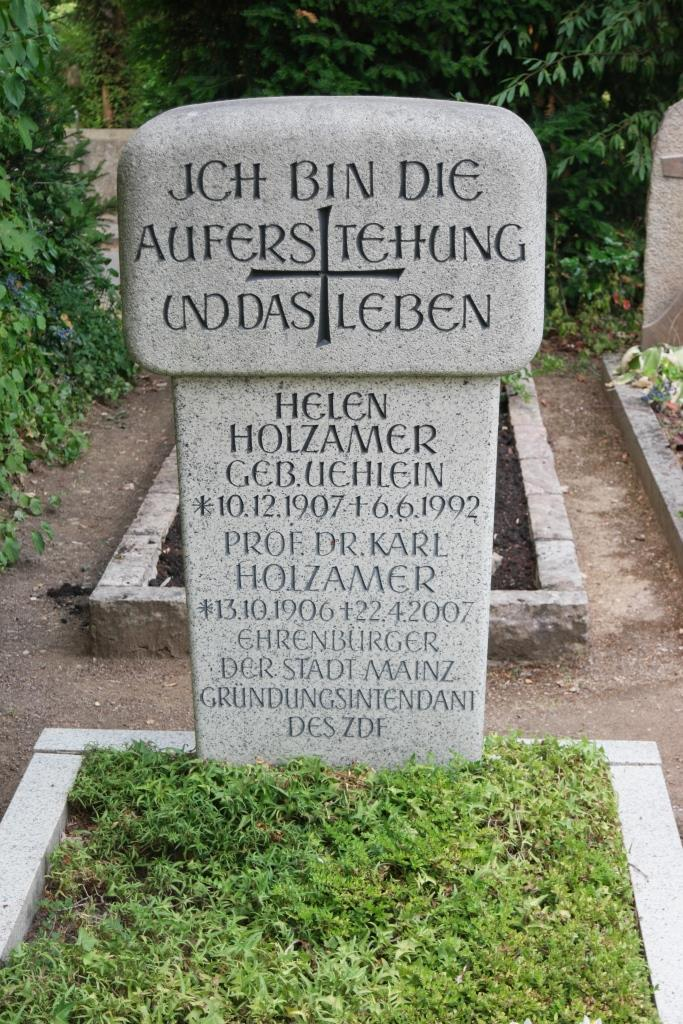 Grab des Gründungsintendanten des ZDF, Karl Holzamer (1906-2007) auf dem Hauptfriedhof Mainz